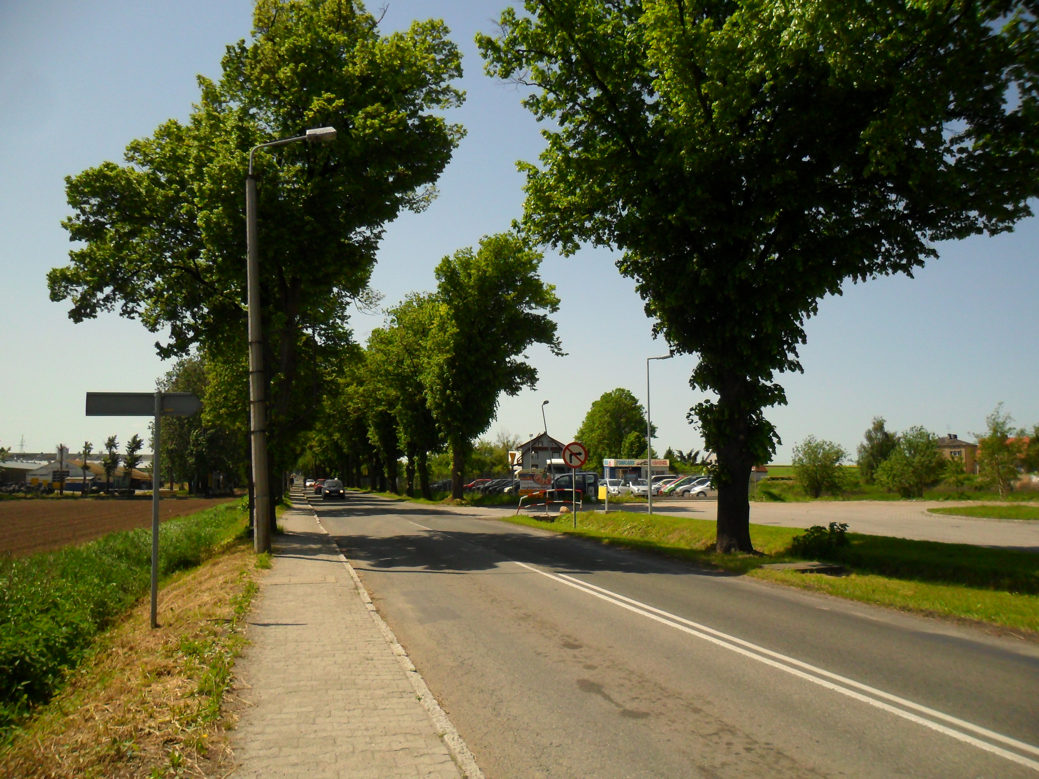 Początek drogi wojewódzkiej nr 916 w Raciborzu - ulica Opawska w pobliżu skrzyżowania z ul. Jana Pawła II i Bogumińską